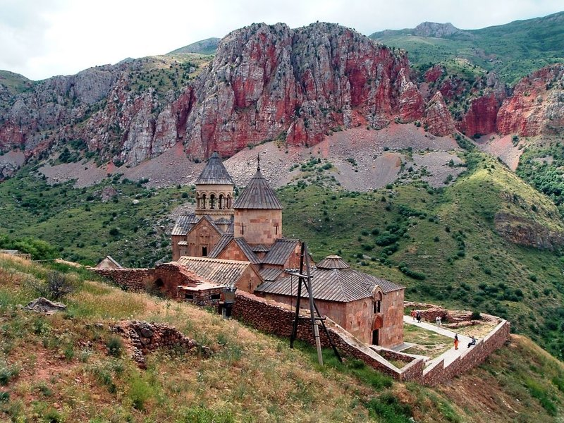 монастырь Норованк